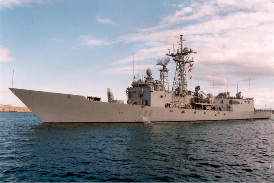 Fragata Canarias (F-86), de la Armada Española, perteneciente a la Clase Santa María